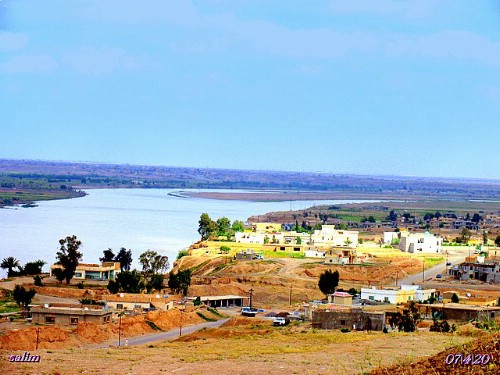 الزوية قبل غزوة داعش